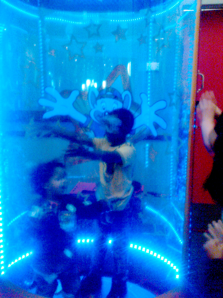 IMG00498-20101023_chuck-e-cheese